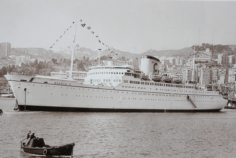 Bianca Costa a Genova